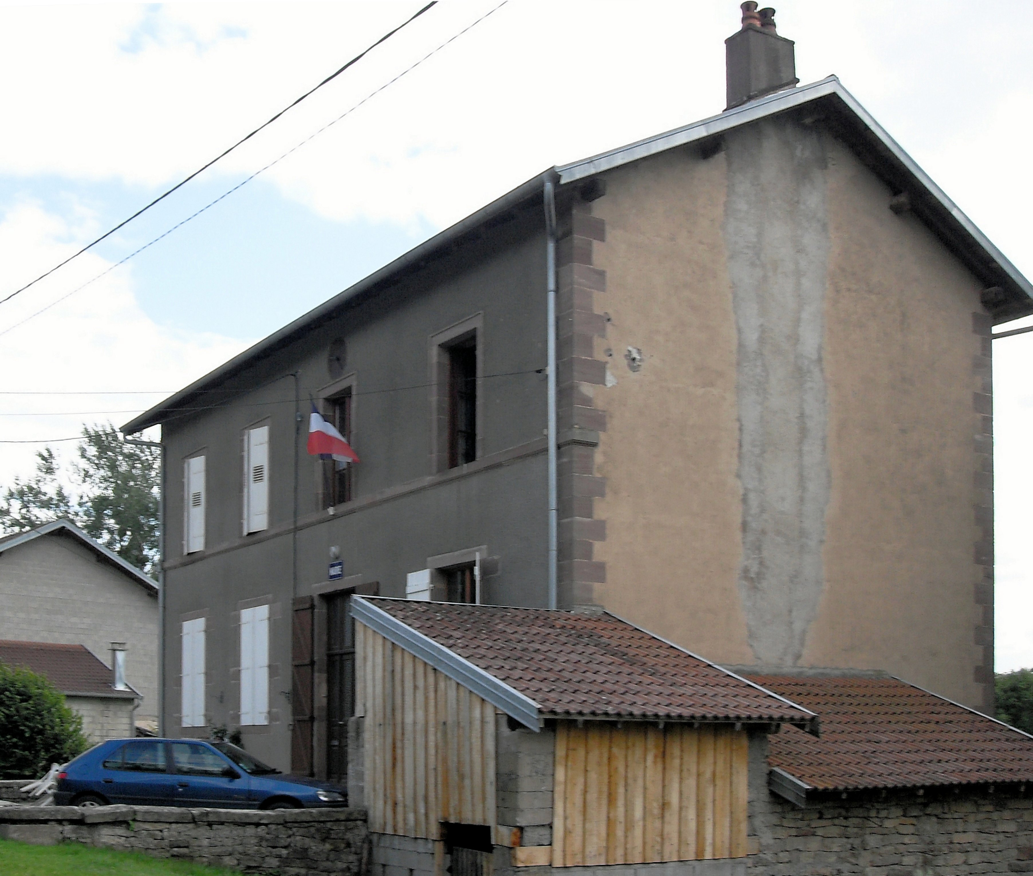 L'ancienne mairie de Magny